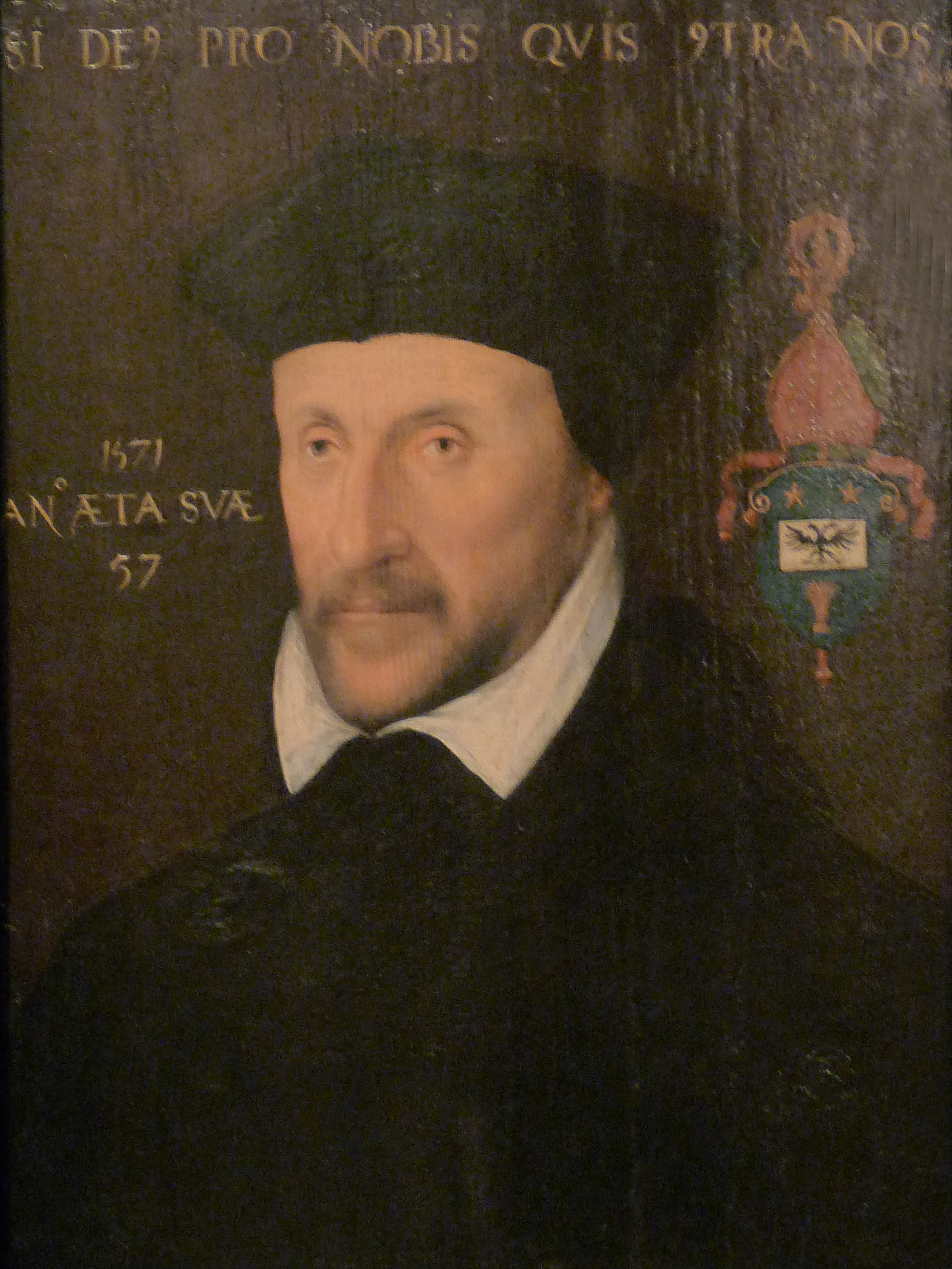 Ecole lorraine du XVIe siècle : Nicolas Psaume, évêque de Verdun. Huile sur bois. 1571. Musée barrois